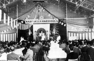 第二田沢起工式